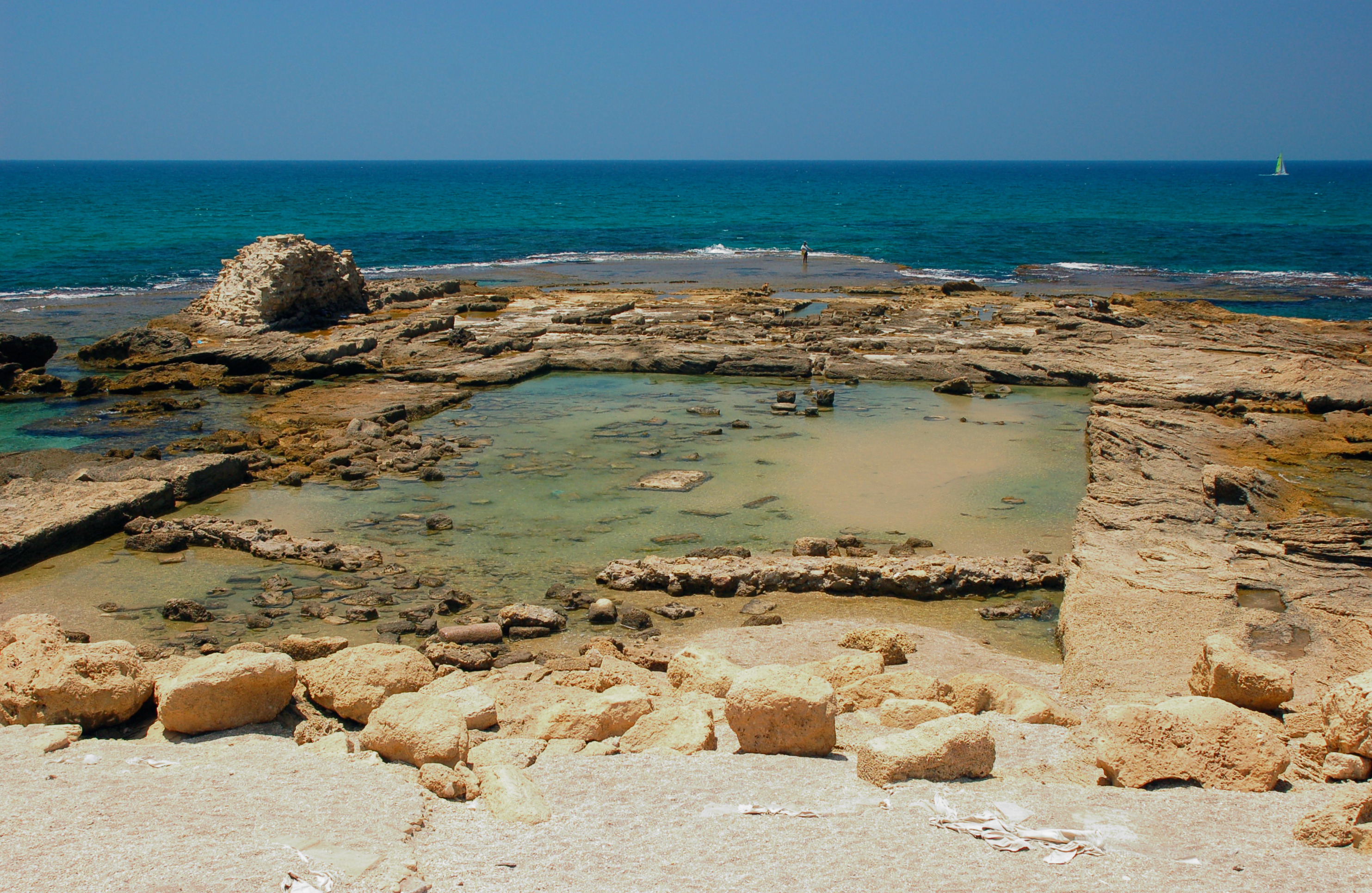 Caesarea Roman Concrete bath ruins